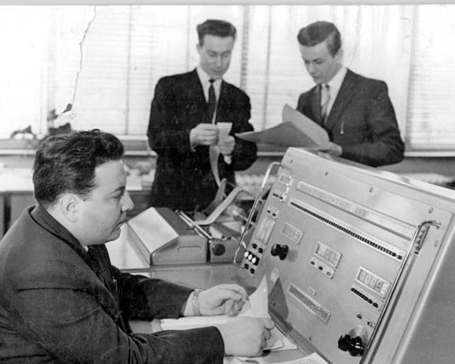 Leipzig, Universität, Rechenzentrum, Kommandopult Zentralbild Koch Ga-Ki. 15.3.1963 Rechenzentrum der Karl-Marx-Universität übergeben Ein im neuen Gebäude des Physiologischen Instituts der Karl-Marx-Universität Leipzig eingerichtetes modernes Rechenzentrum wurde am 14.März, dem 80. Todestag von Karl Marx feierlich seiner Bestimmung übergeben. Damit wurde gleichzeitig an der Mathematisch-naturwissenschaftlichen Fakultät das Institut für maschinelle Rechentechnik geschaffen, dessen Leitung Prof.Dr. Hans Rohleder übernommen hat. (Näheres siehe ADN-Meldung Nr. 736 v.14.März 1963) UBz: Blick in das Rechenzentrum mit dem Rechenautomaten ZRA 1 voI DDR M VEB Carl Zeiss Jena, dem Herzstück des Rechenzentrums. Am Kommandopult Diplommathematiker Klaus Apitzsch, hinter dem Zeilendrucker der Wirtschaftsmathematiker Harald Friedrich und der Diplommathematiker Siegmar Gerber (v.l.n.r).